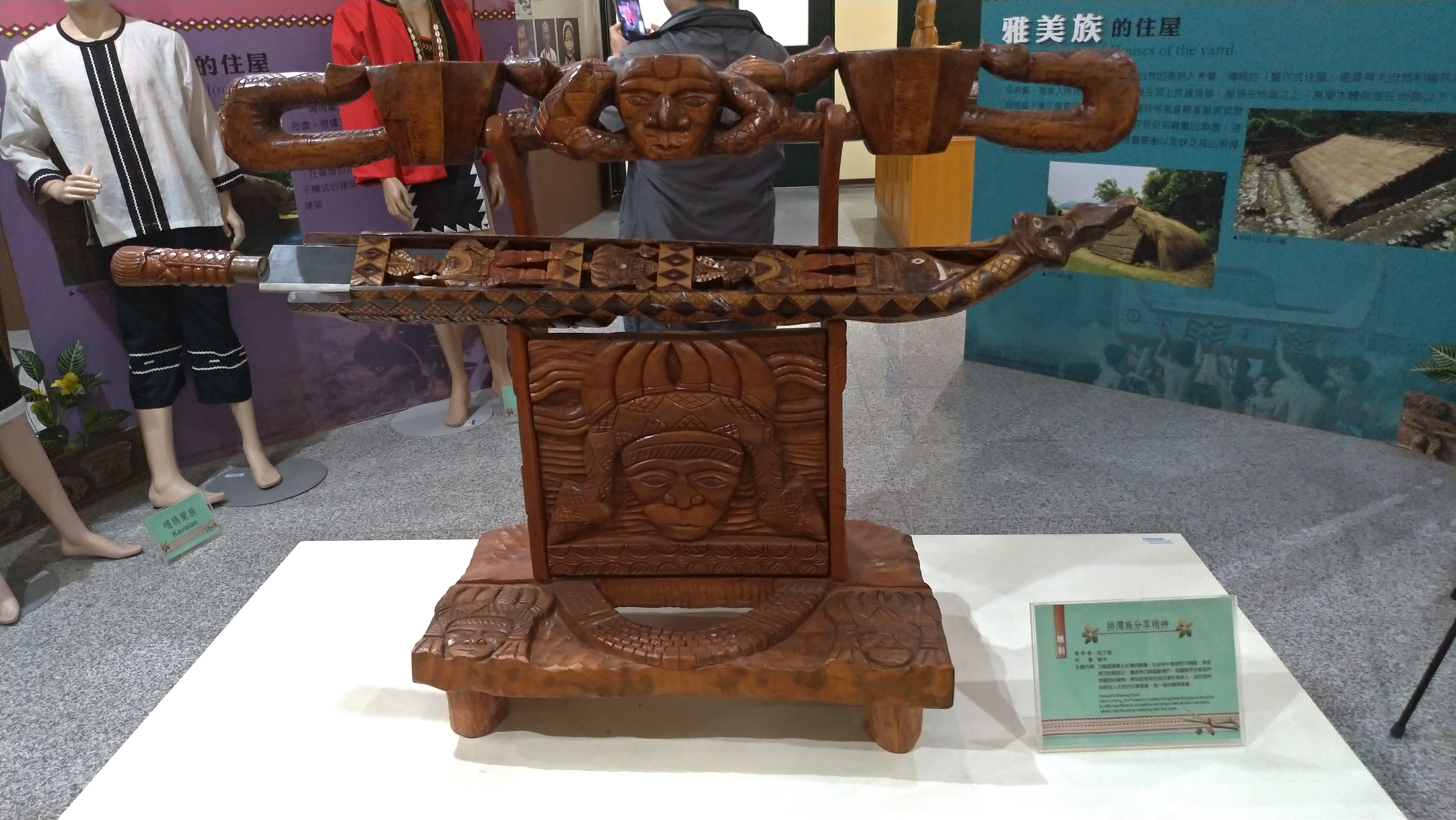 中文（台灣）: 台灣原住民，排灣族分享精神